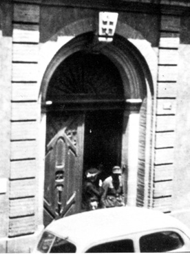 Arrestation de Monseigneur Moussaron par la Gestapo, le 12 juin 1944.